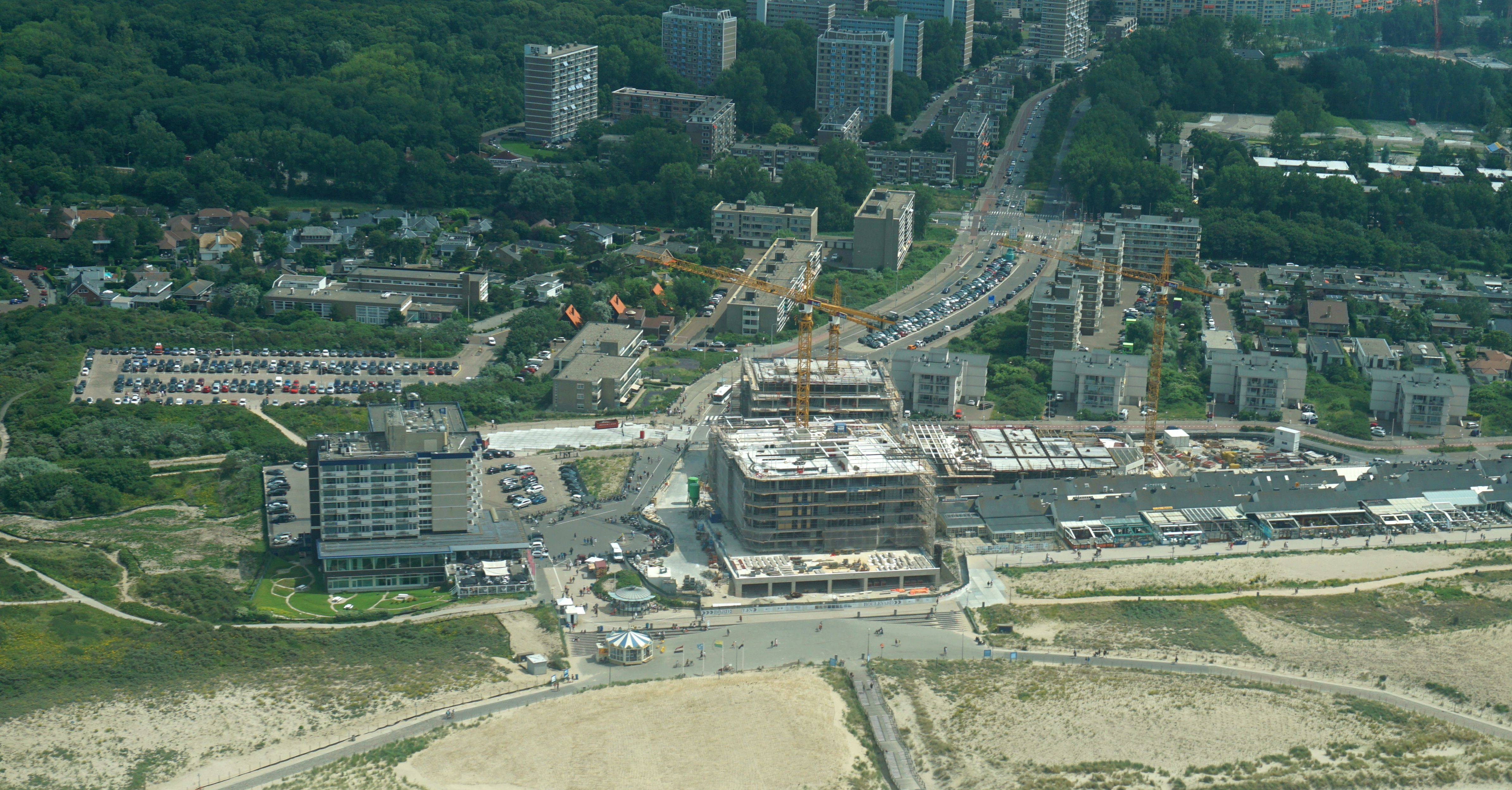 Luchtfoto Kijkduin 30-06-2019